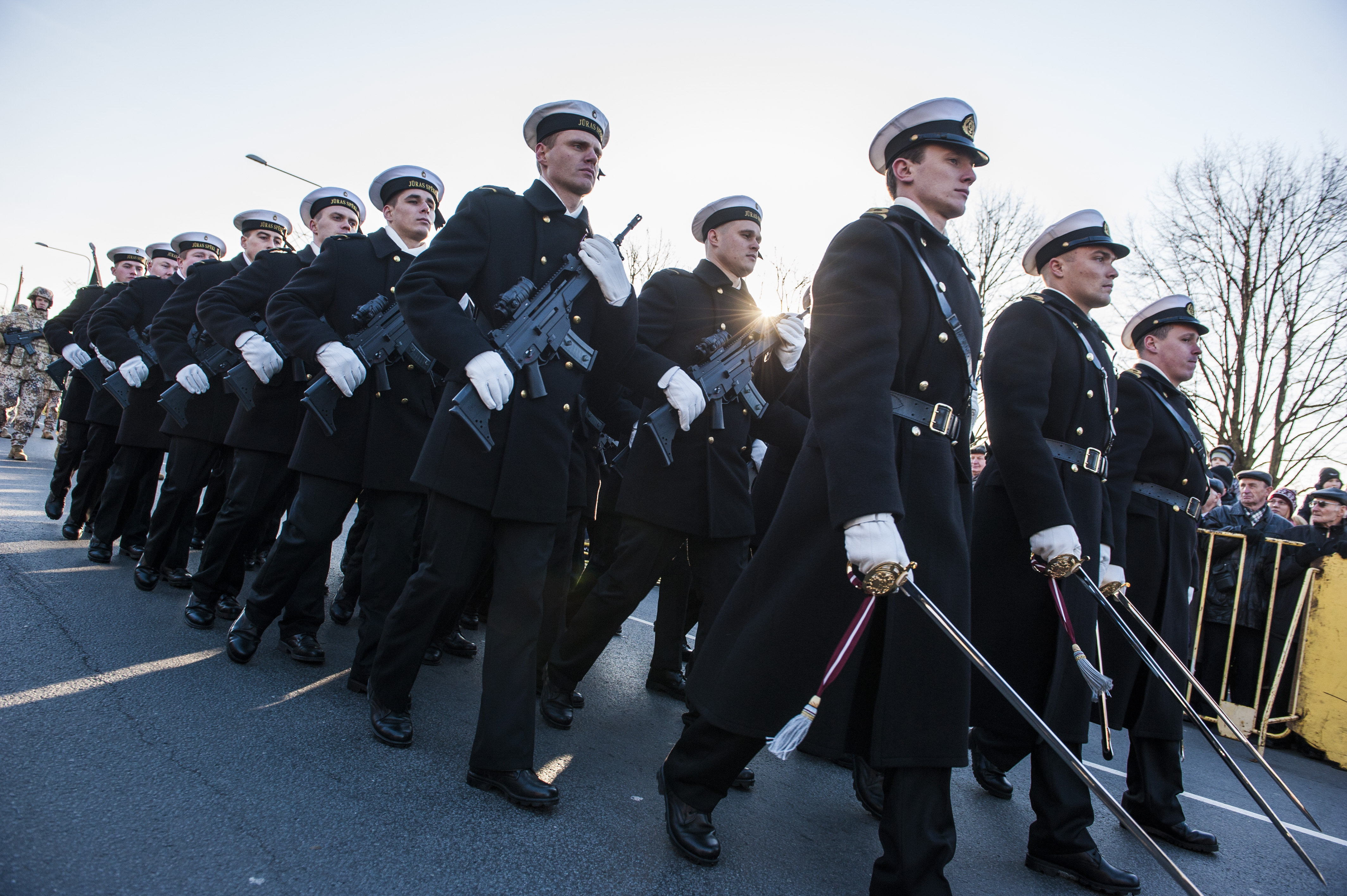 2014.gada 18.novembris. 11.novembra krastmalā notiek svinīgā Nacionālo Bruņoto spēku parāde. Foto: Reinis Inkēns, Saeimas Kanceleja